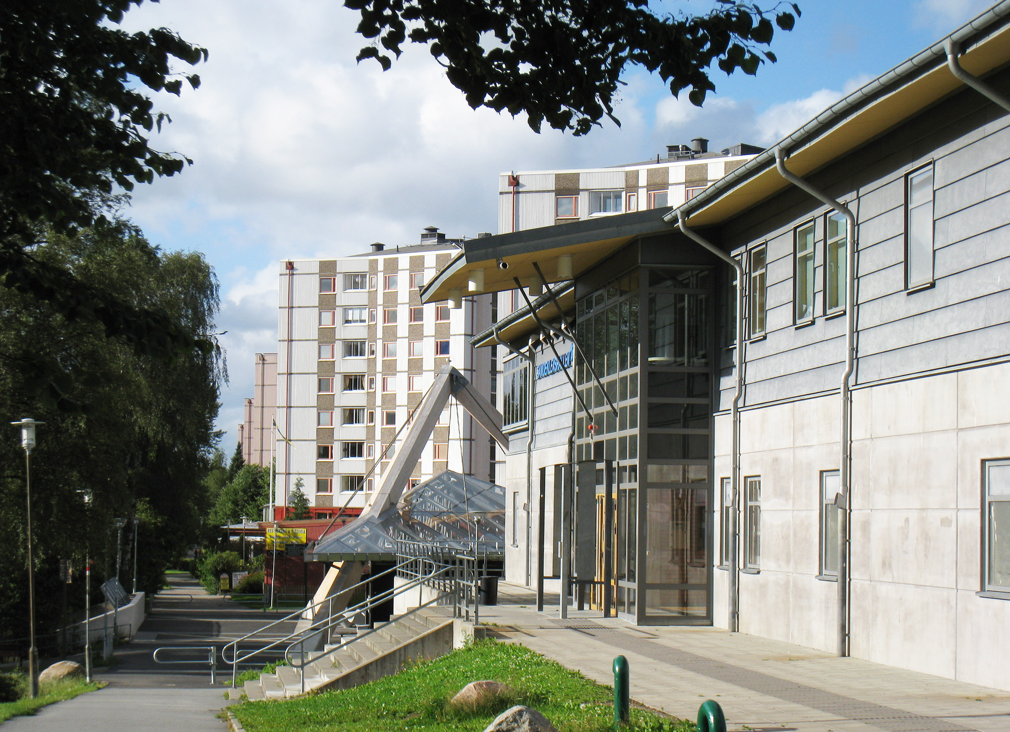 Sandeklevshallen. Sporting facility. Bergsjön, Göteborg.